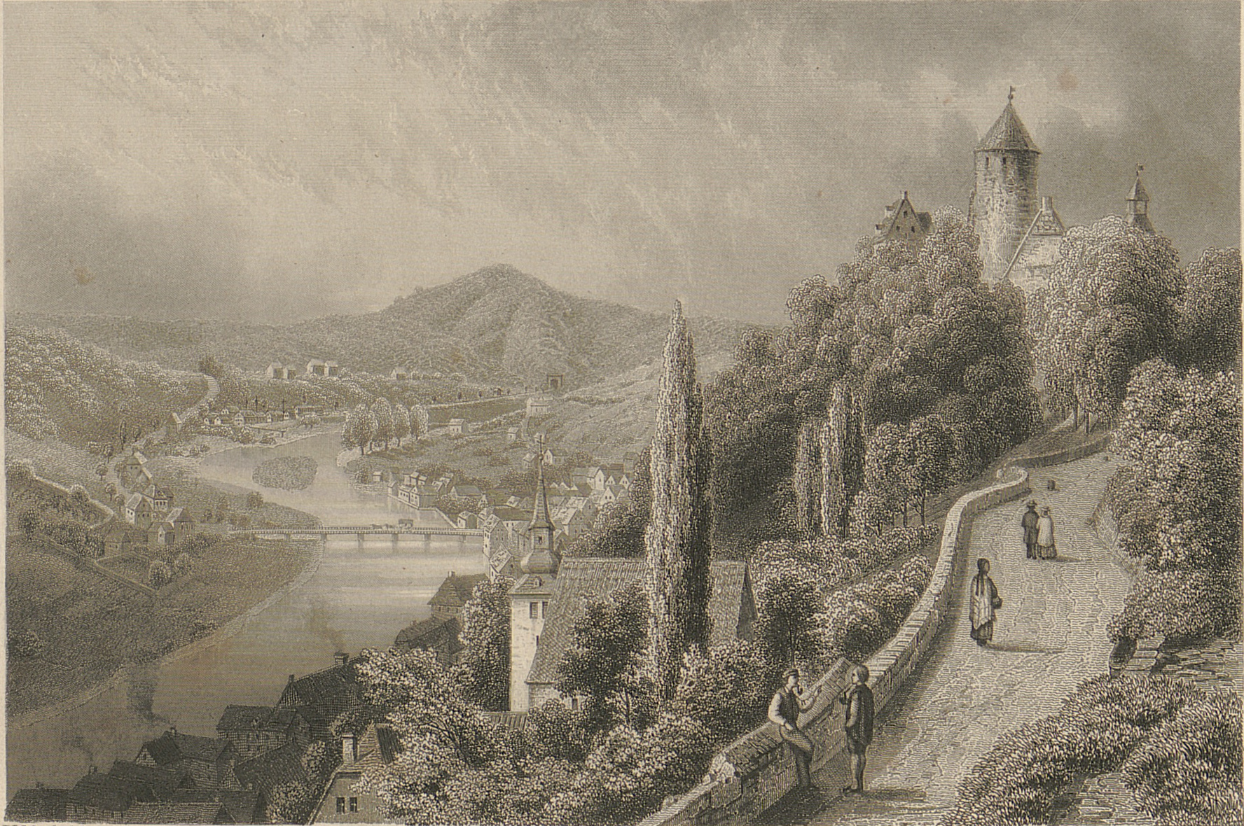 Altena an der Lenne